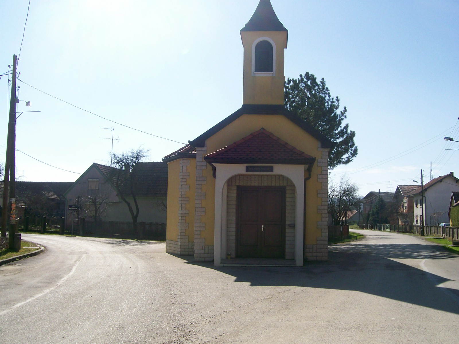 Kapelica u Ključu Brdovečkom